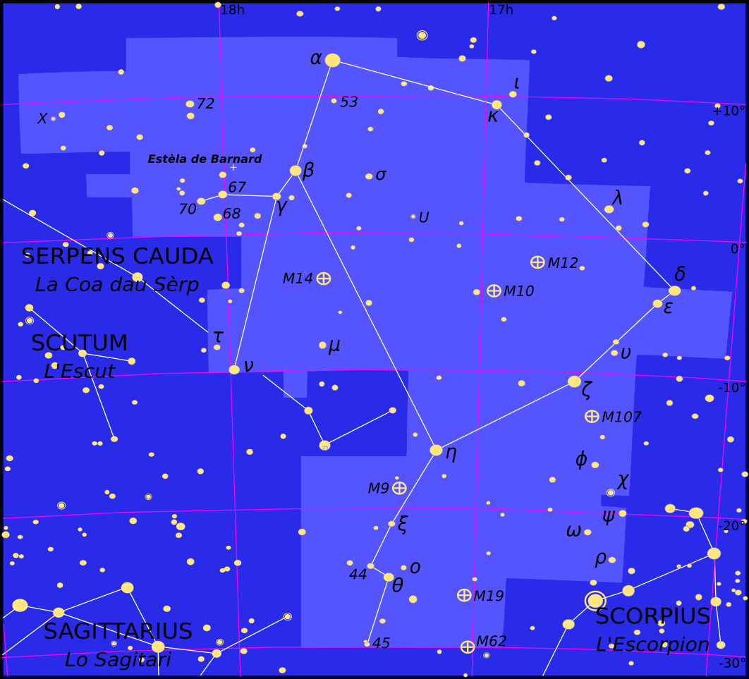 Constellacion dau Serpentari.